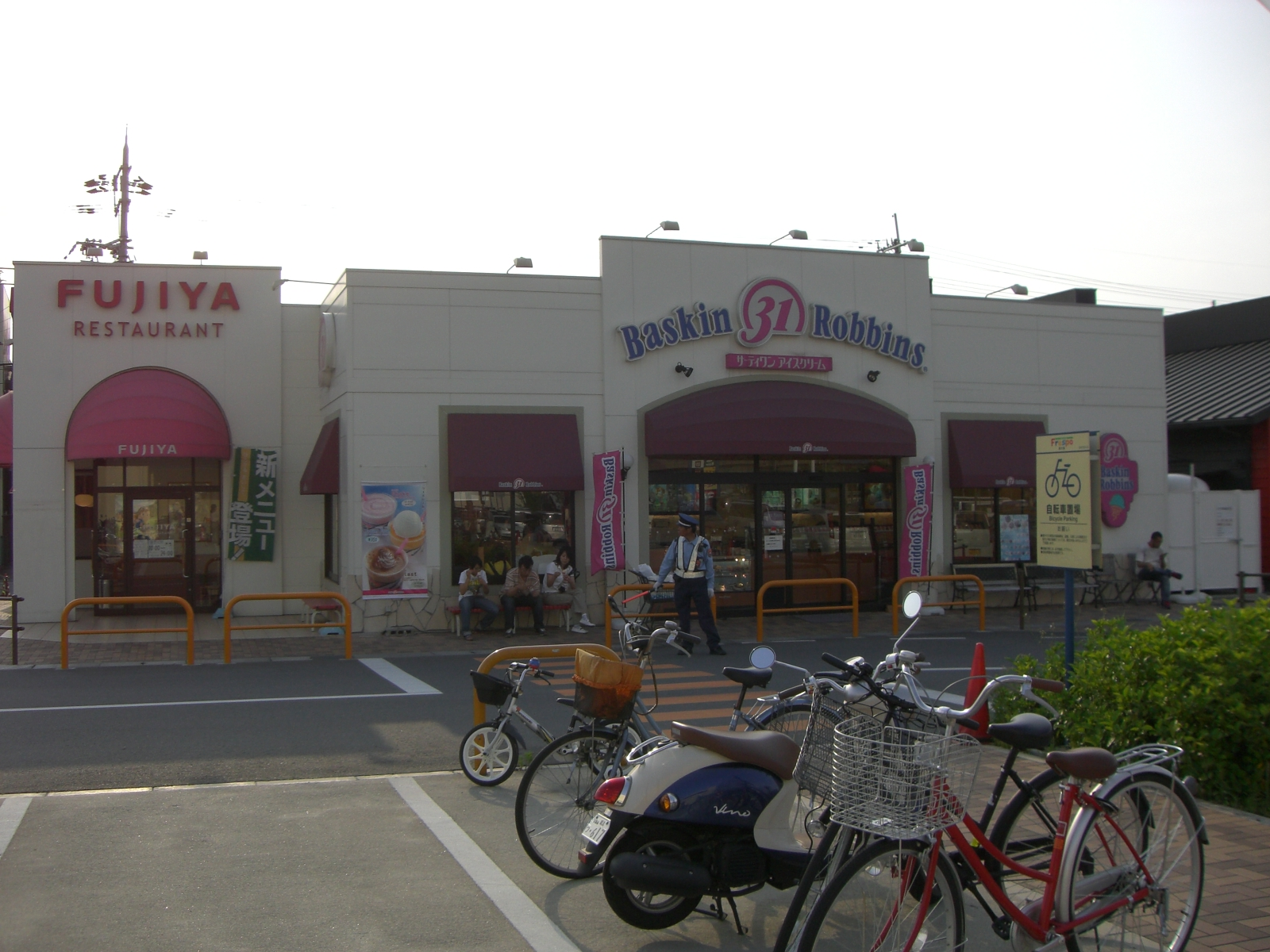 Fujiya&31Ice